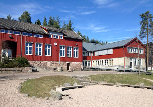 Maridalen skole i Oslo